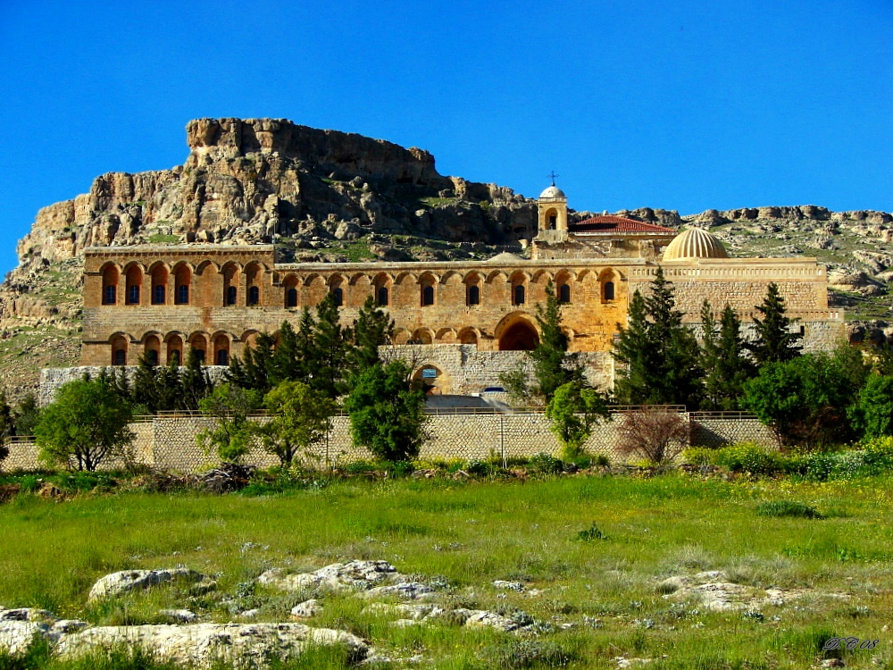 Kurdî: Ji Merdin Dera kevn